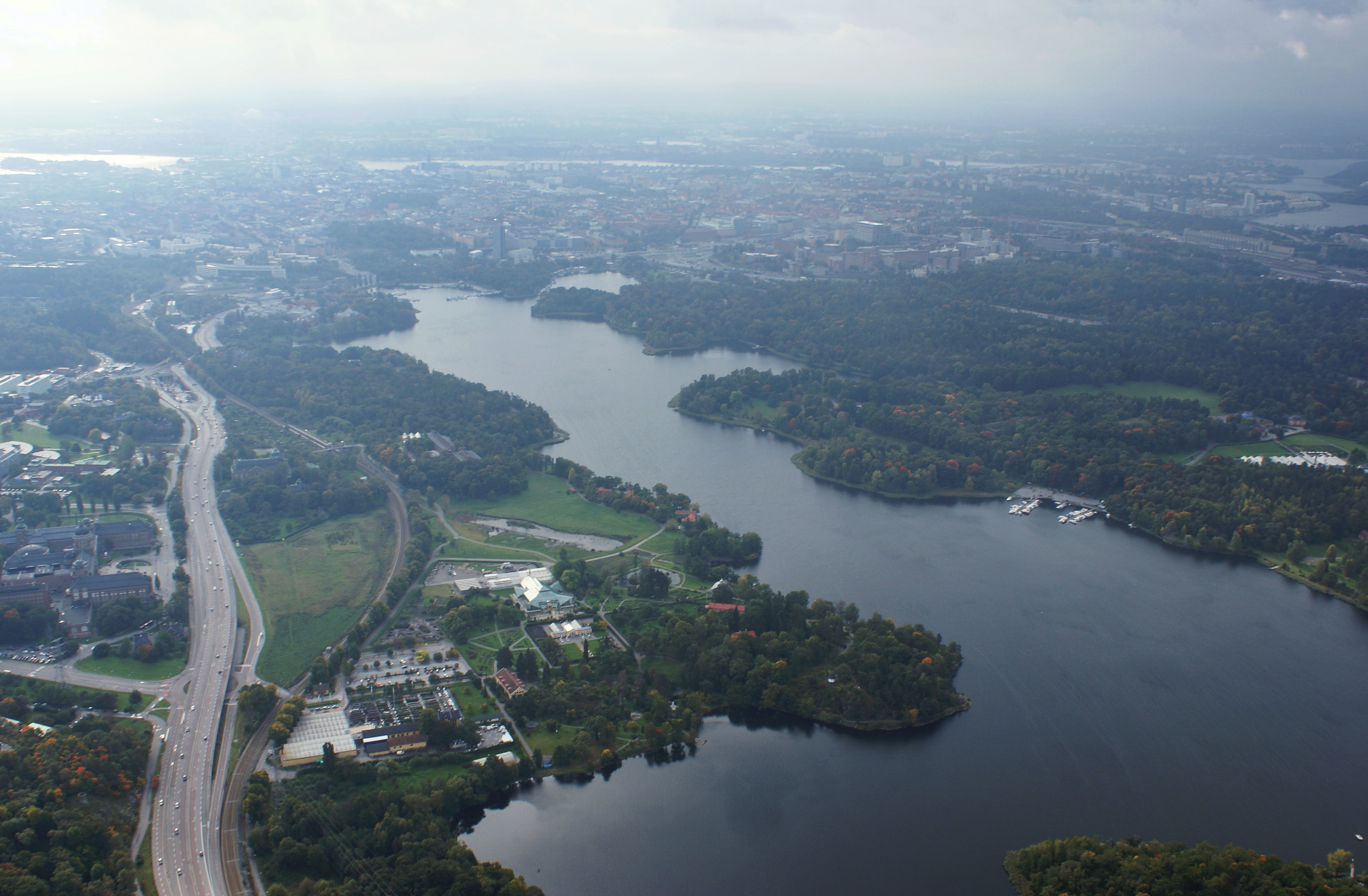 Brunnsviken sedd från helikopter, vy mot syd och Stockholm. Bergianska trädgården syns i bildmitt och till vänster syns Roslagsvägen.